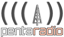 Logo des Pentaradio Angebotes des C3D2 (CCC Erfa Dresden)